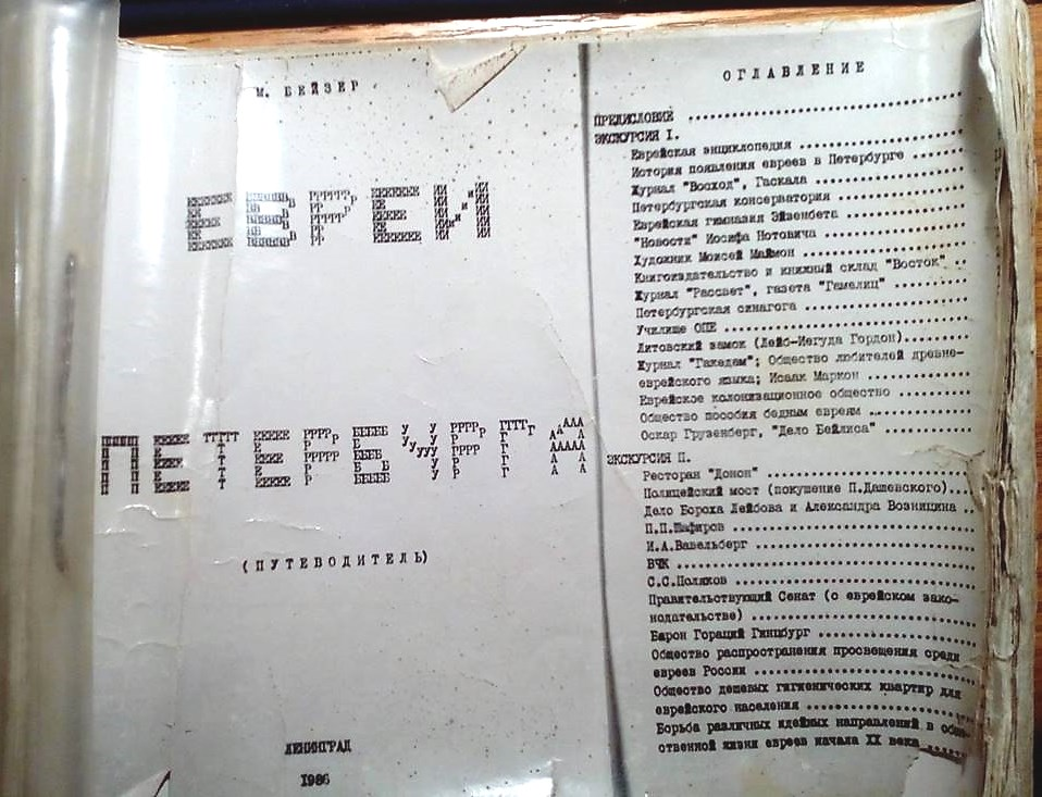 Самиздатовская книга «Евреи Петербурга» (Ленинград, 1986 год), изданная Михаэлем Бейзером.